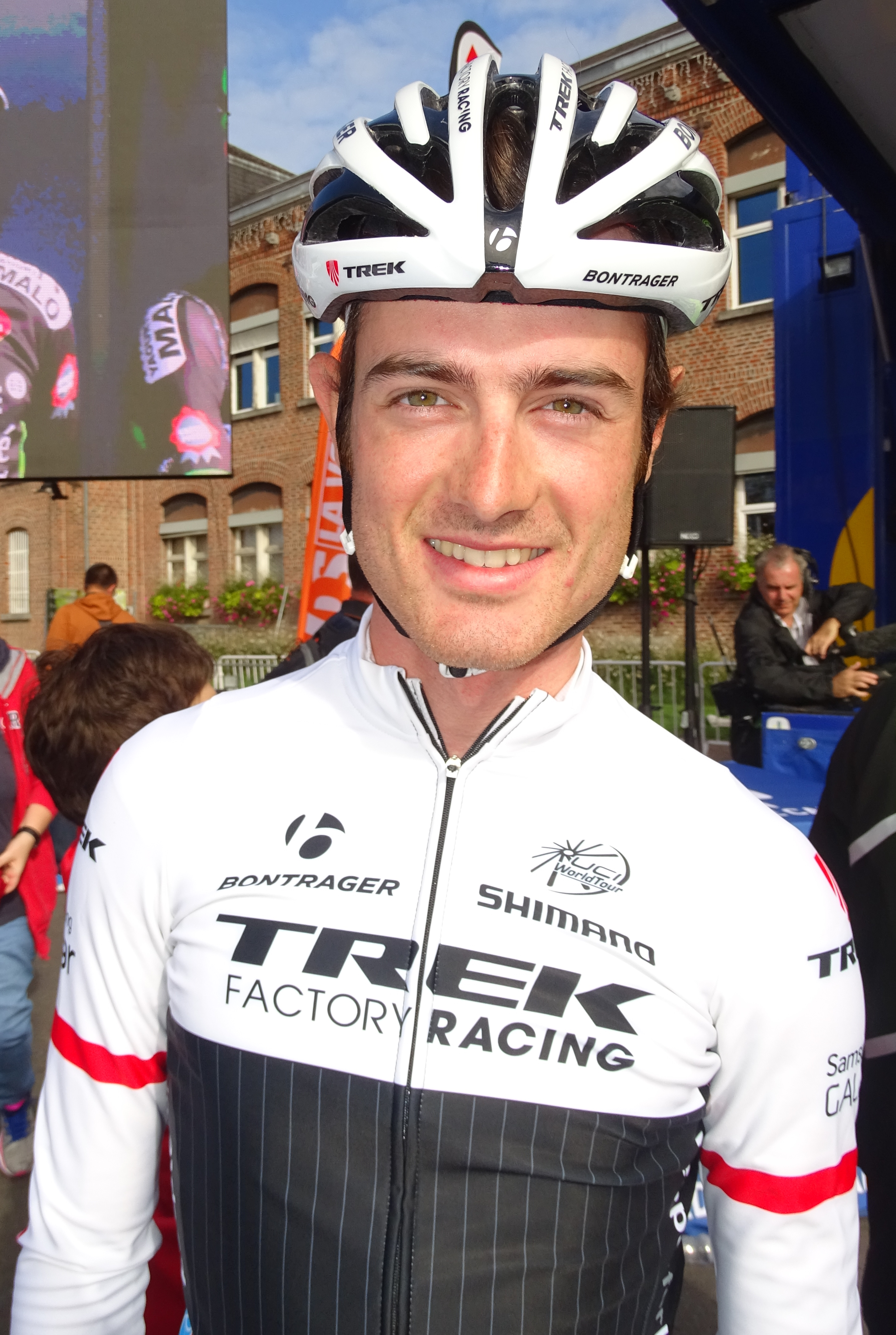 Reportage réalisé le dimanche 6 septembre à l'occasion du départ et de l'arrivée du Grand Prix de Fourmies 2015 à Fourmies, Nord-Pas-de-Calais, France.